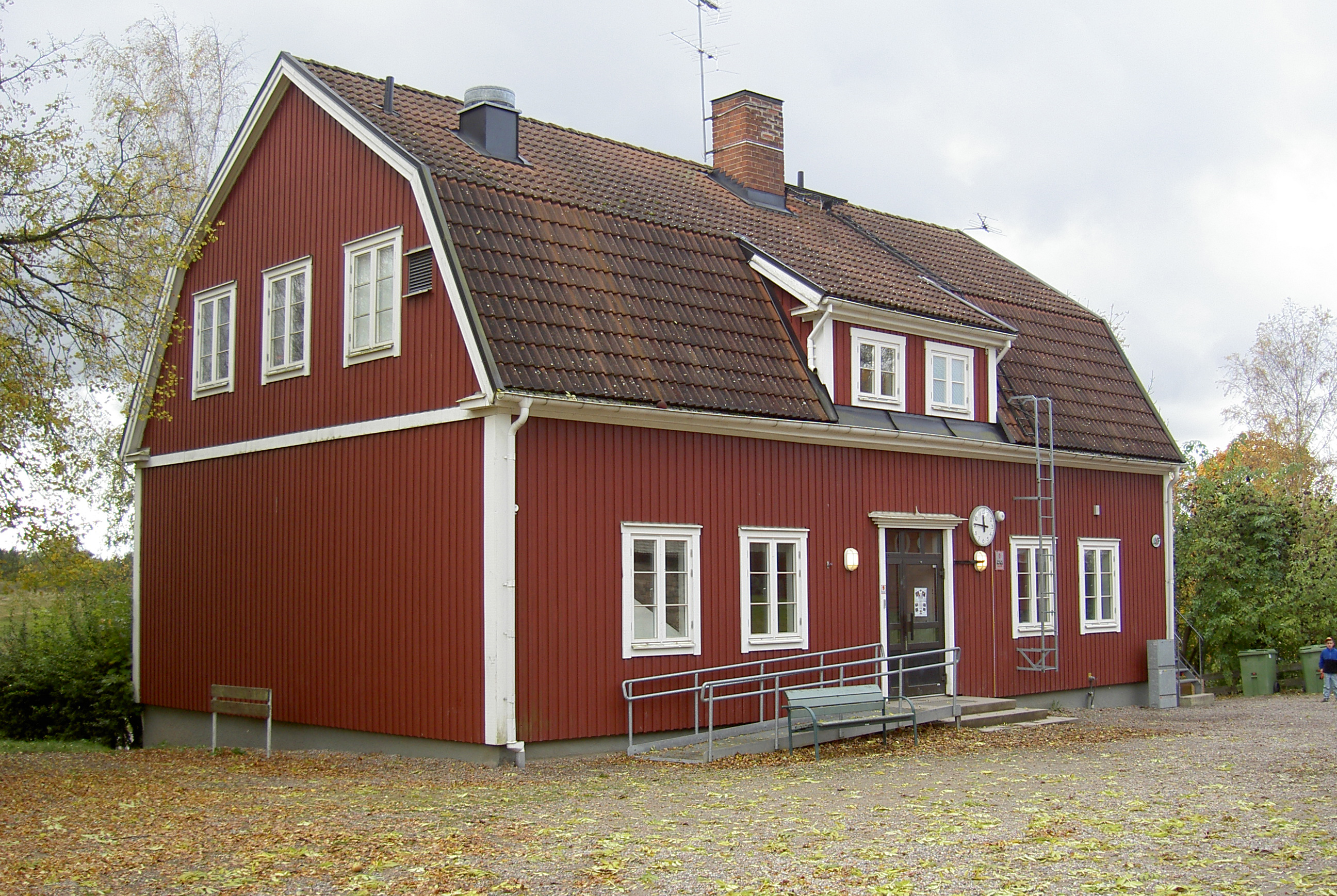 Askeby gamla skolas huvudbyggnad. Byggnaden revs i juli 2014 inför uppförandet av den nya skolbyggnaden.